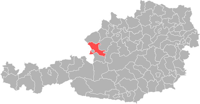 Bezirk Salzburg-Umgebung in Österreich